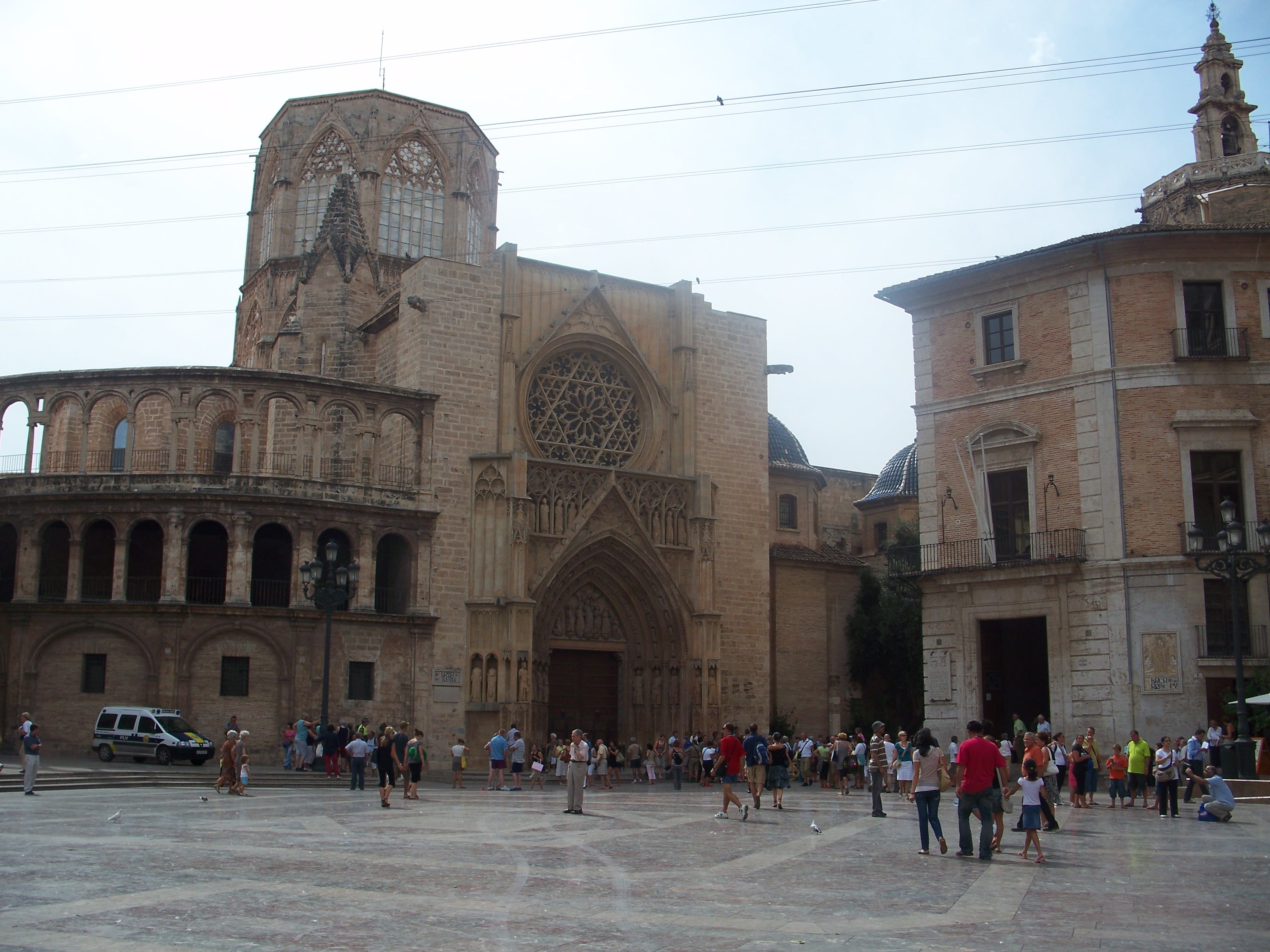 Plaça_de_la_Mare_de_Déu_(València)_Setembre_2008